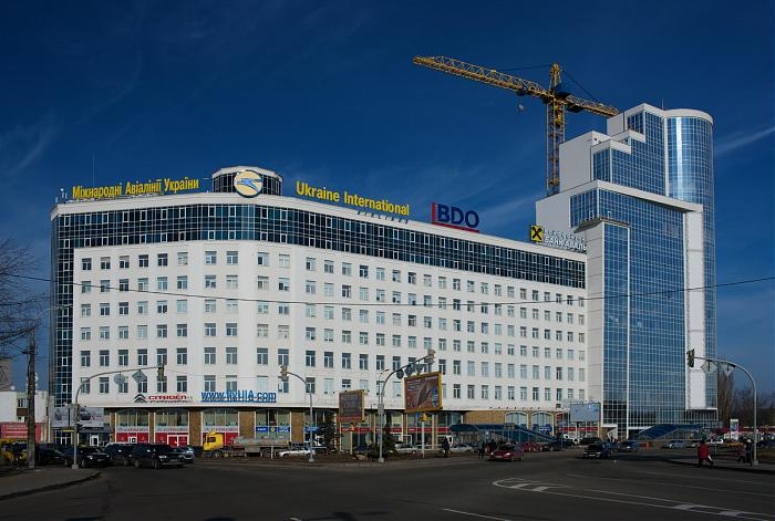 joinup kyiv office